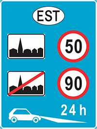 Liikluskord